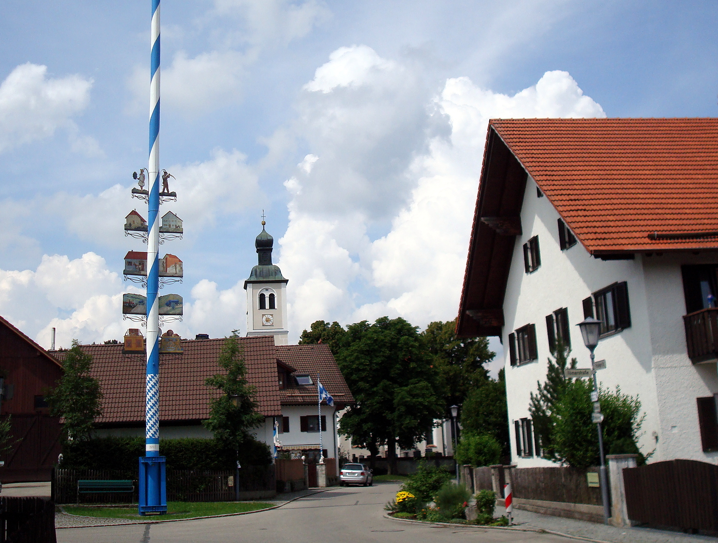 Starnberg, OT Perchting, Dorfmitte.